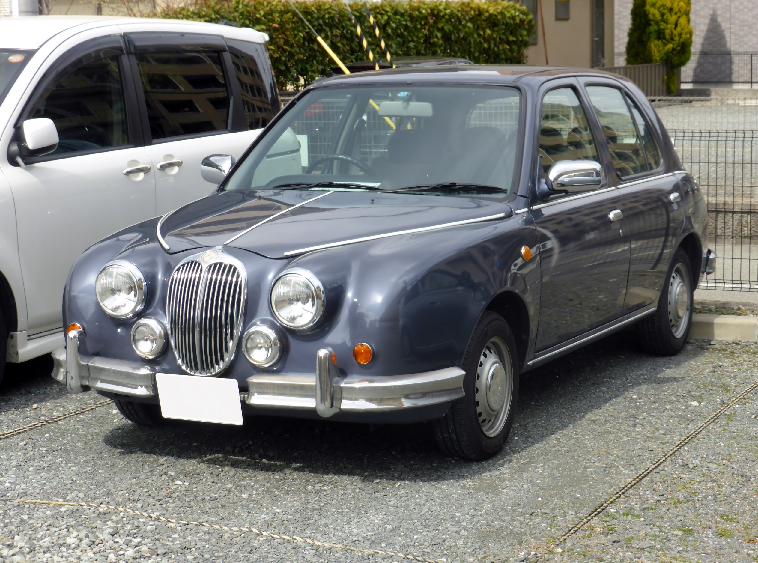 K11ベースの初代光岡・ビュートをフロントから撮影。